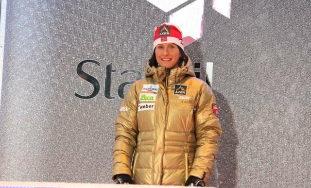 Marit Bjørgen podczas ceremonii medalowej po biegu indywidualnym kobiet na 15 kilometrów w ramach Mistrzostw Świata w Narciarstwie Klasycznym 2011 w Oslo.